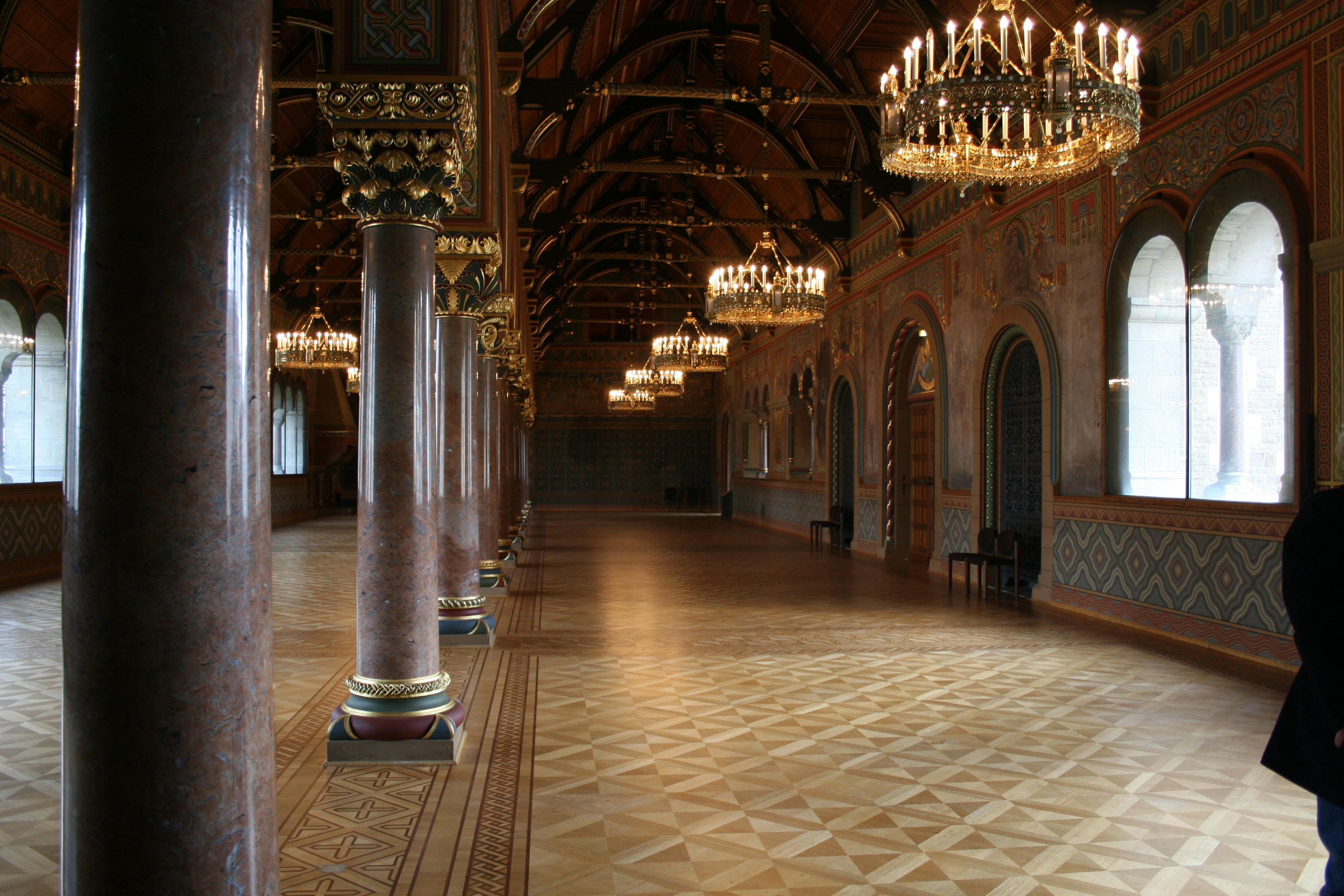 Rittersaal der Burg Dankwarderode, Braunschweig